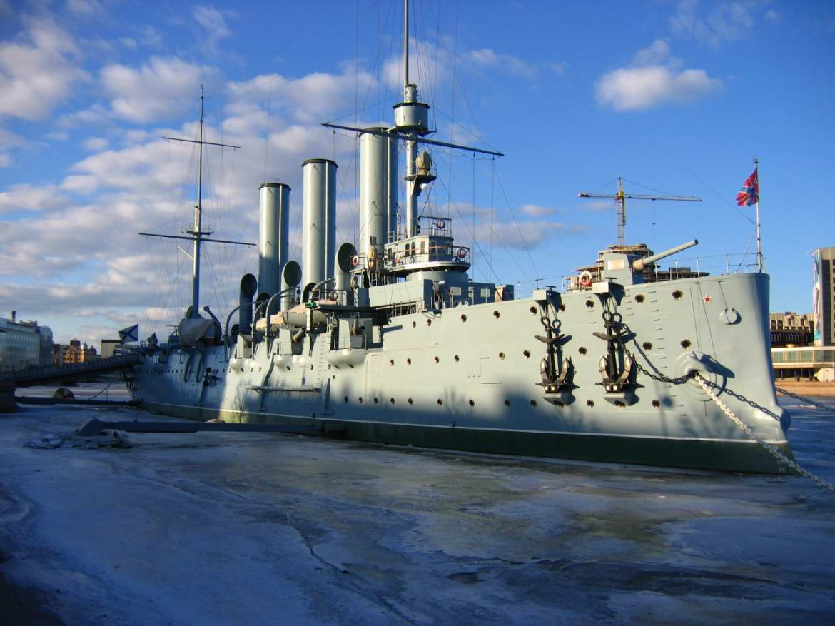 Крейсер Аврора, Санкт-Петербург, Россия